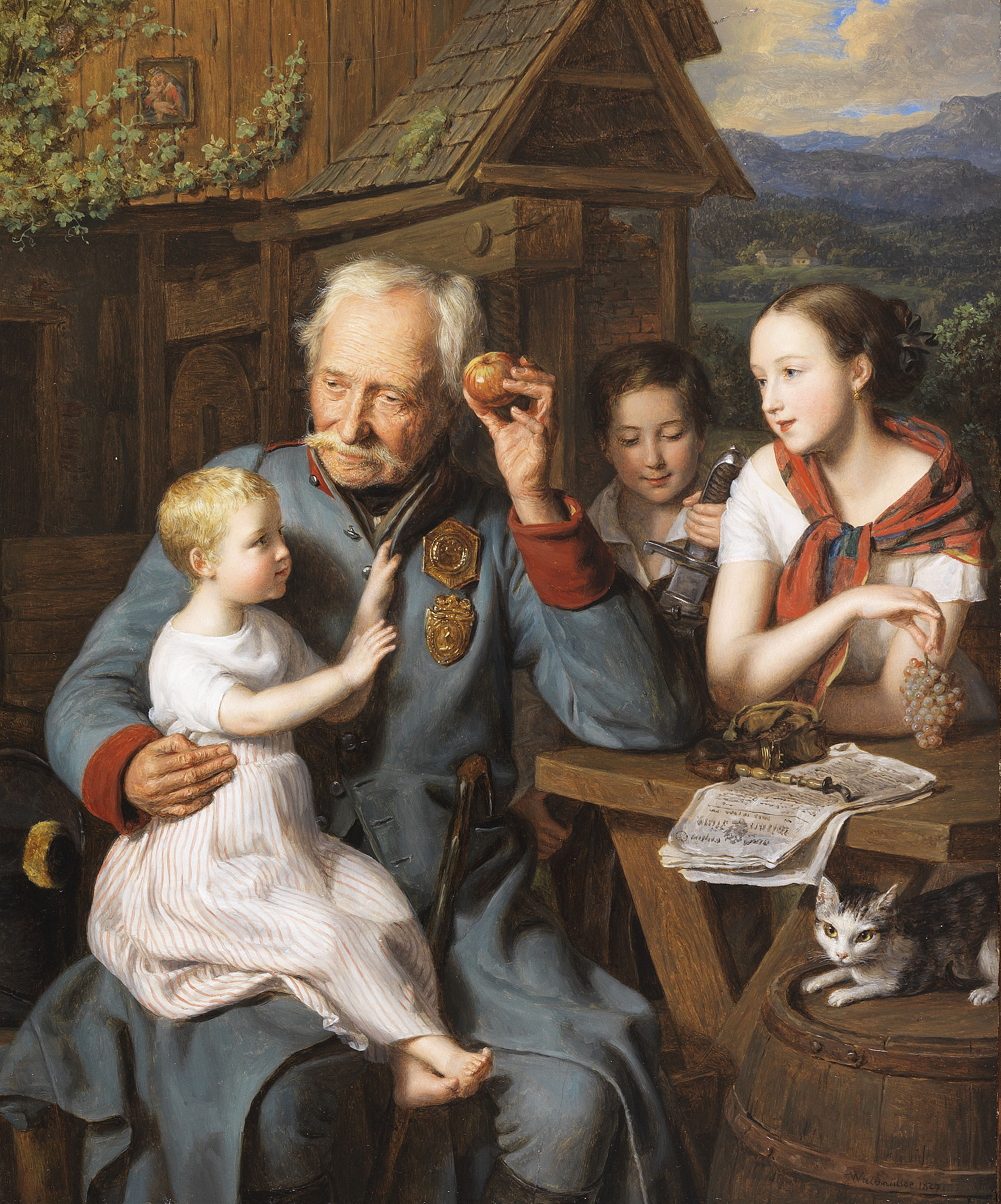 Ein alter Invalide mit drei Kindern. 1827. Öl auf Holz. Feuchtmüller 230. Rechts unten signiert und datiert. 31,5 x 26 cm Provenienz: Sammlung des österreichischen Kaisers Franz Josef I. Schloßhauptmannschaft Schönbrunn (1918 Übergang in österreichischen Staatsbesitz). Österreichische Galerie Belvedere (1924 als Leihgabe). 1926 laut Ministerial-Erlass von der Österreichischen Galerie verkauft. Sammlung Kommerzienrat Josef Siller, Wien (1926). Sammlung Rudolf Steiner, Wien (vor 1934). Beschlagnahmung durch die Gestapo in Wien (Ende 1938). Galerie Maria Almas-Dietrich, München (Januar 1939). Sonderauftrag Linz (Projekt "Führermuseum", Linz-Nr. 577, vor Juni 1939). Central Collection Point der Alliierten, München (registriert 18. Oktober 1945, Mü-Nr. 10561). Übergabe des Gemäldes an die BRD (10. Juni 1949). Übergabe des Gemäldes an das Österreichische Generalkonsulat in München (5. Dezember 1958) und Rückführung nach Wien. Restituierung des Gemäldes durch das Bundesdenkmalamt Wien an Rudolf Steiner (31. März 1959). Sotheby's, München, 21. Juni 1994, Lot 54 (mit Farb-Abb. im Kat). Privatsammlung Süddeutschland.